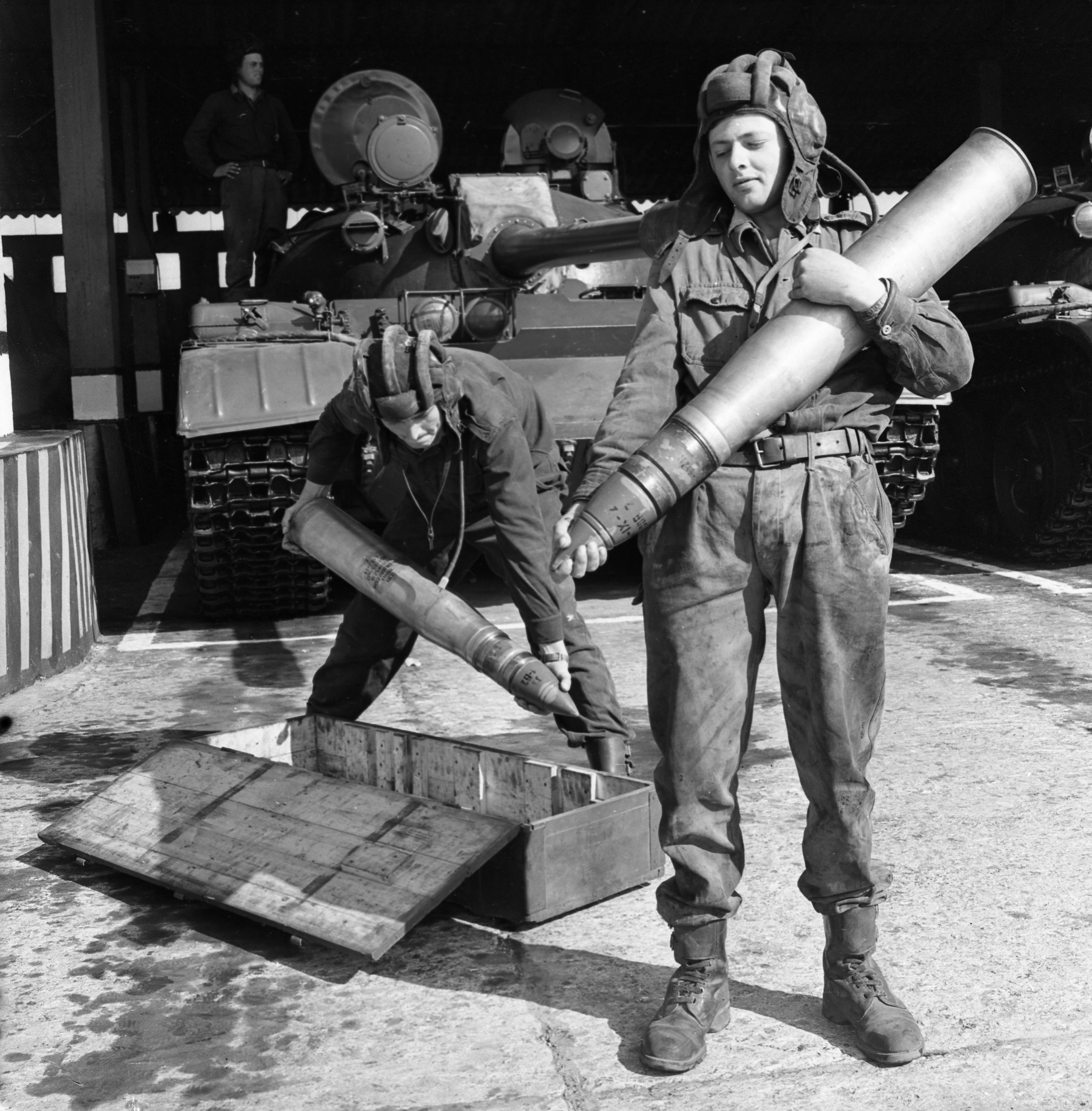 a Magyar Néphadsereg harckocsizó alakulata. MN 11. Harckocsi Hadosztály? Tata Location: Hungary, Tata Tags: tank, military Title: a Magyar Néphadsereg harckocsizó alakulata.